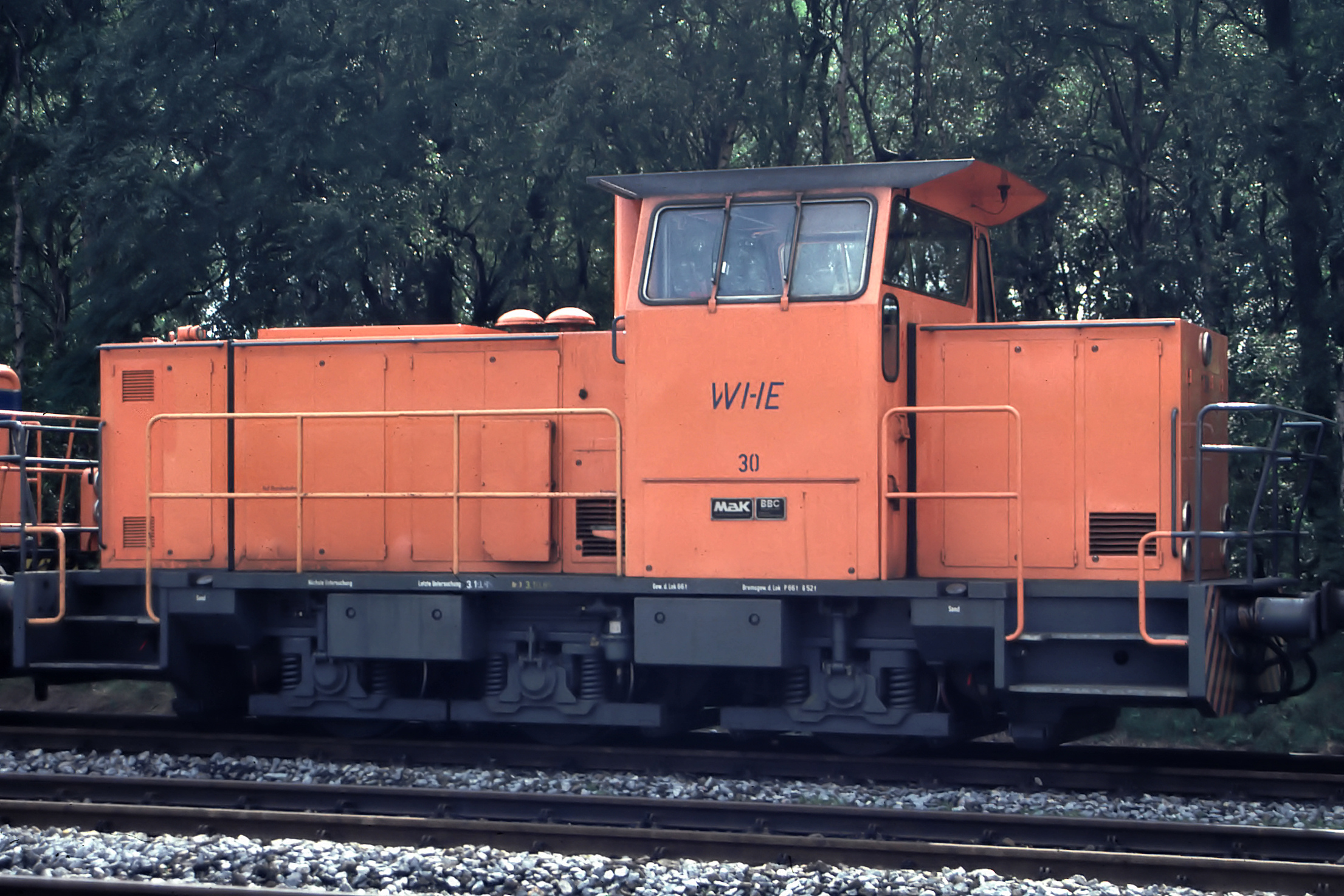 MaK DE 502 als Lok 30 der WHE im Herner Westhafen